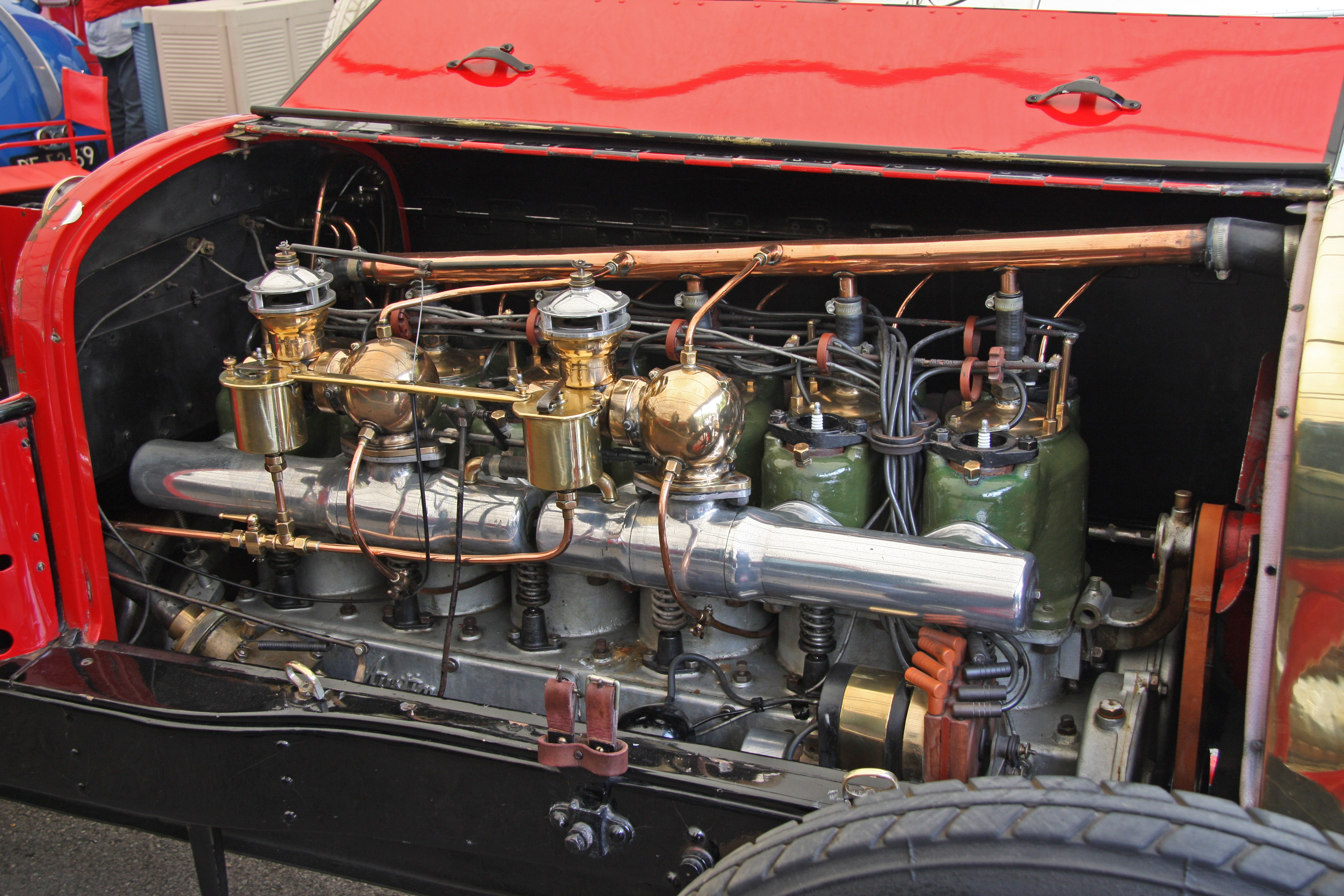 Built 1908. 9.7 litre 6 cylinder